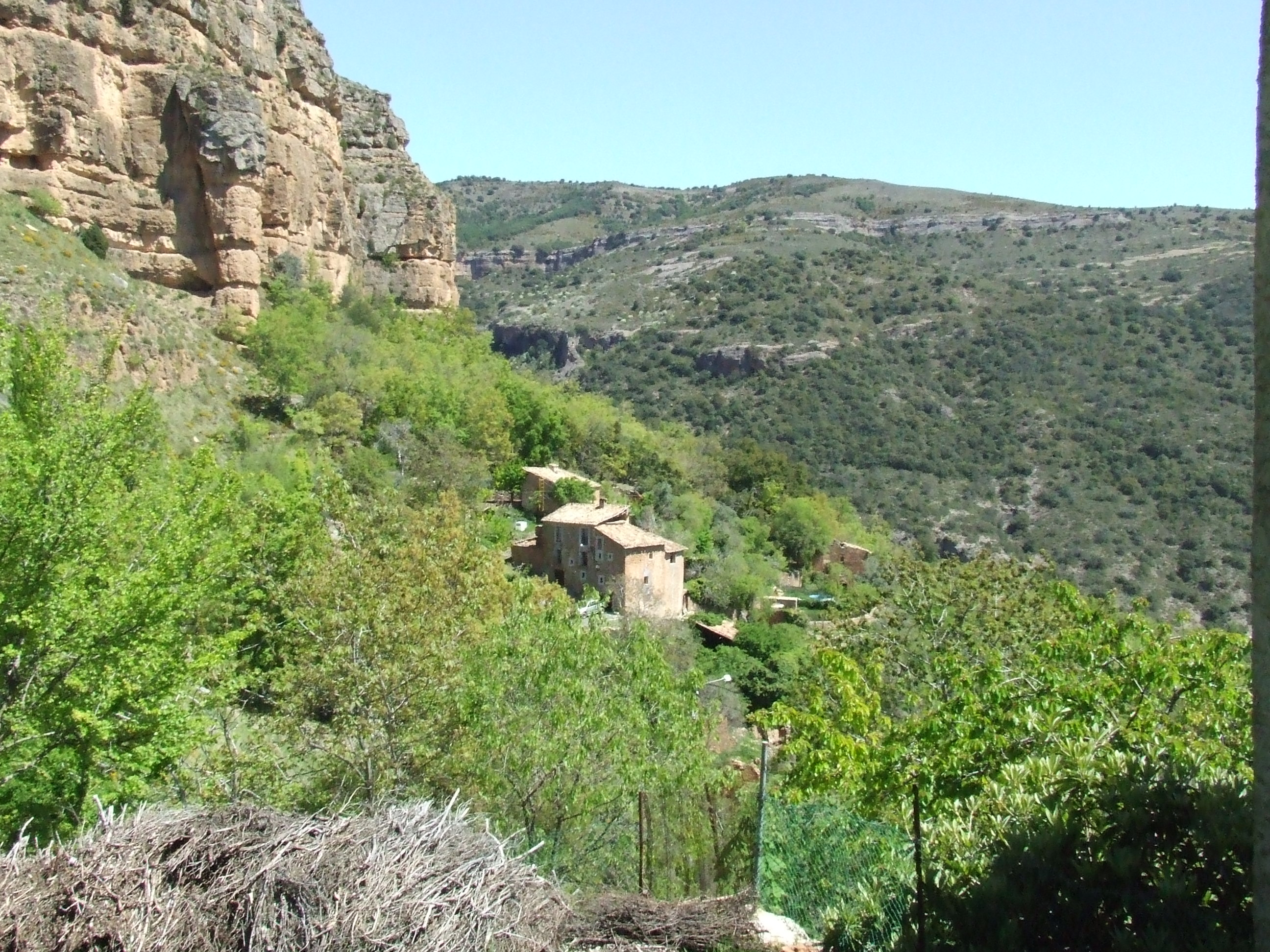 El Raval de Gurp (Gurp de la Conca, Tremp, Pallars Jussà)